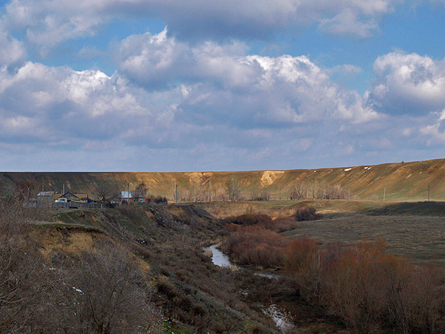 Sowetskoje (ehem. Mariental), Russland.